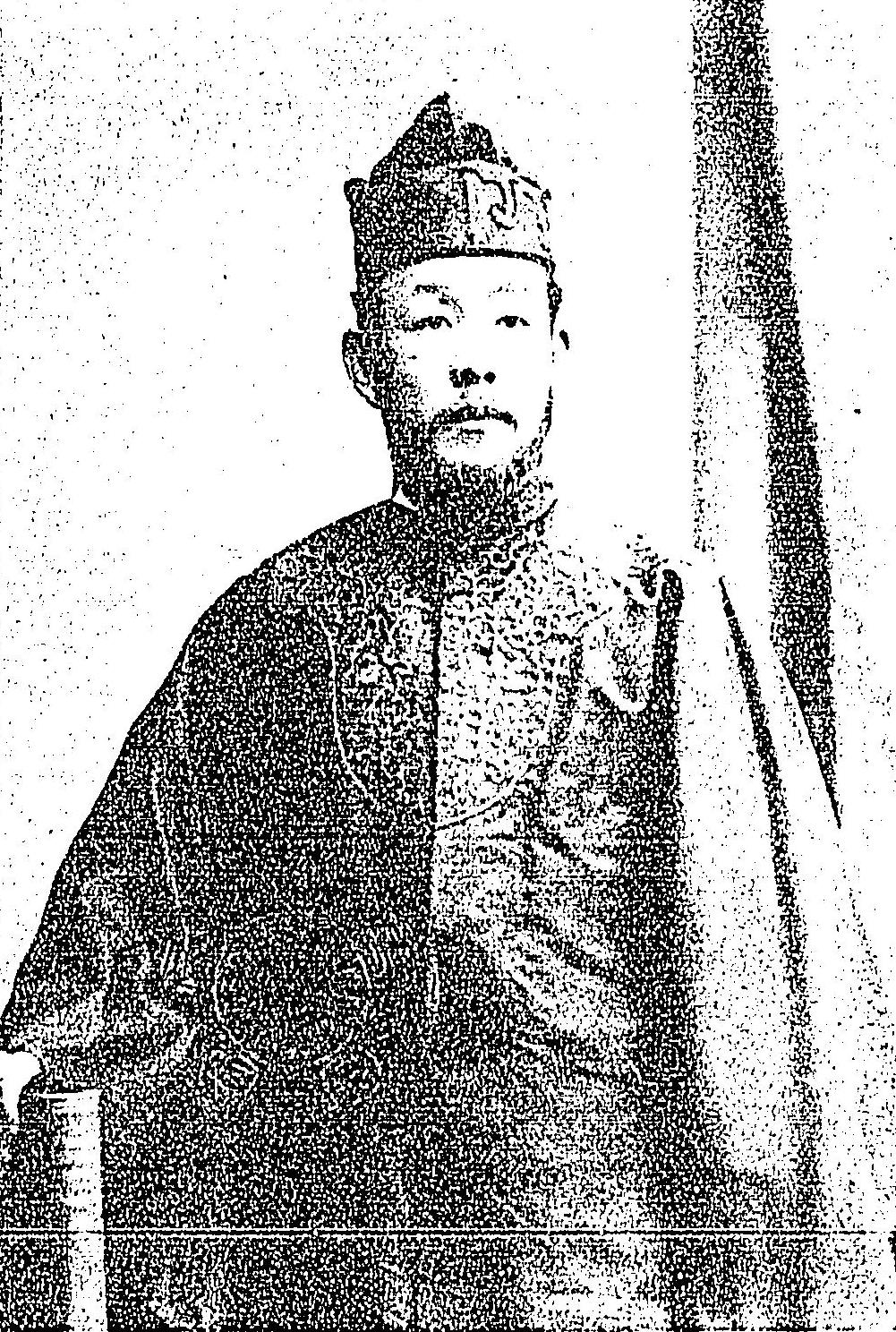 岡村輝彦（明治弁護士列伝）